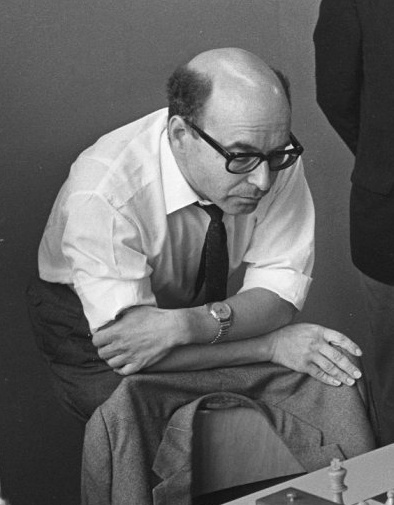 David Bronstein. IBM schaaktoernooi Amsterdam